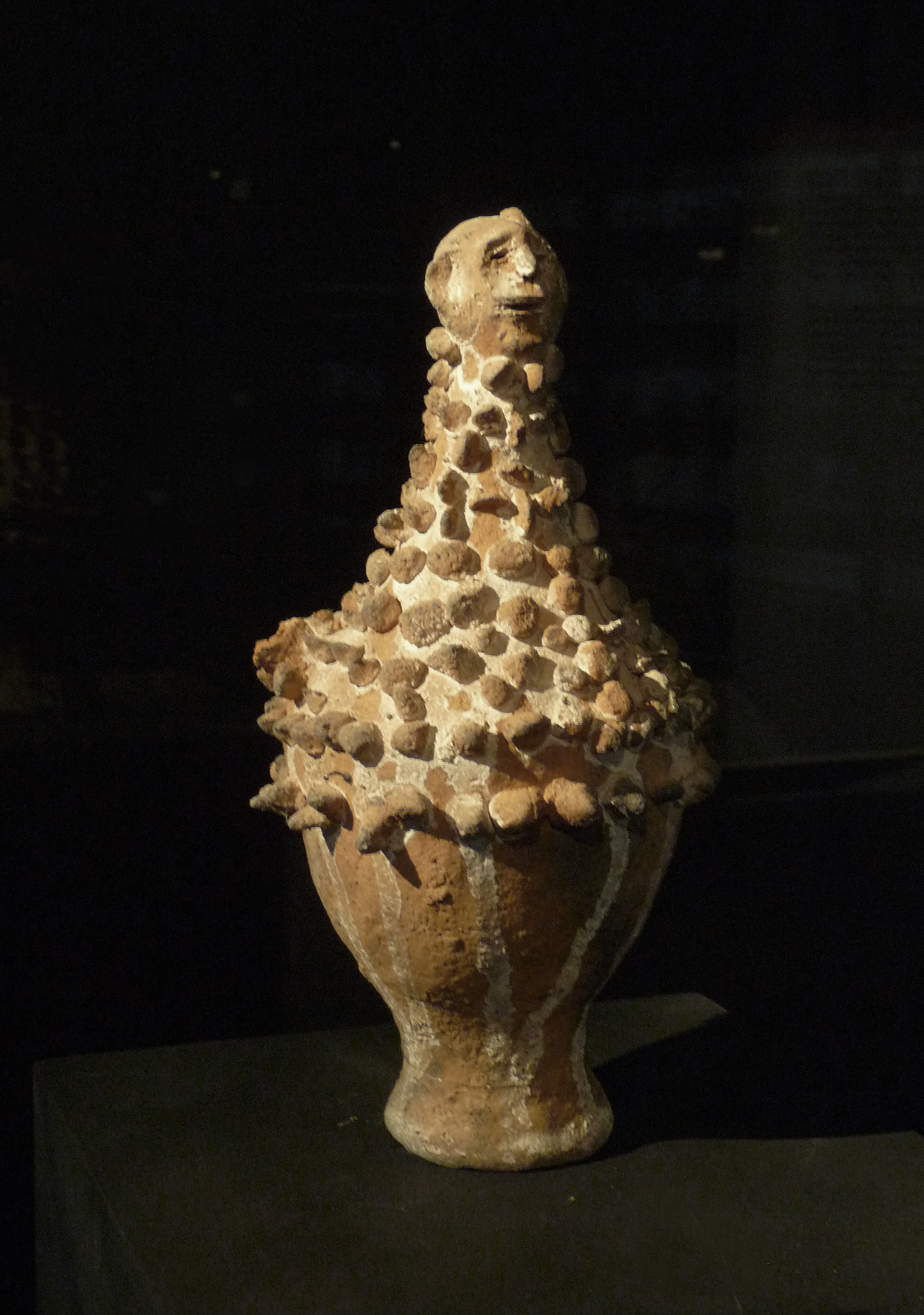 Tula : Récipient de guérison beji. Céramique. Fowler Museum. Exposition Nigeria. Arts de la vallée de la Bénoué au musée du quai Branly (Paris).